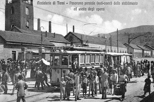 Terni, convoglio tranviario in sosta davanti alle acciaierie